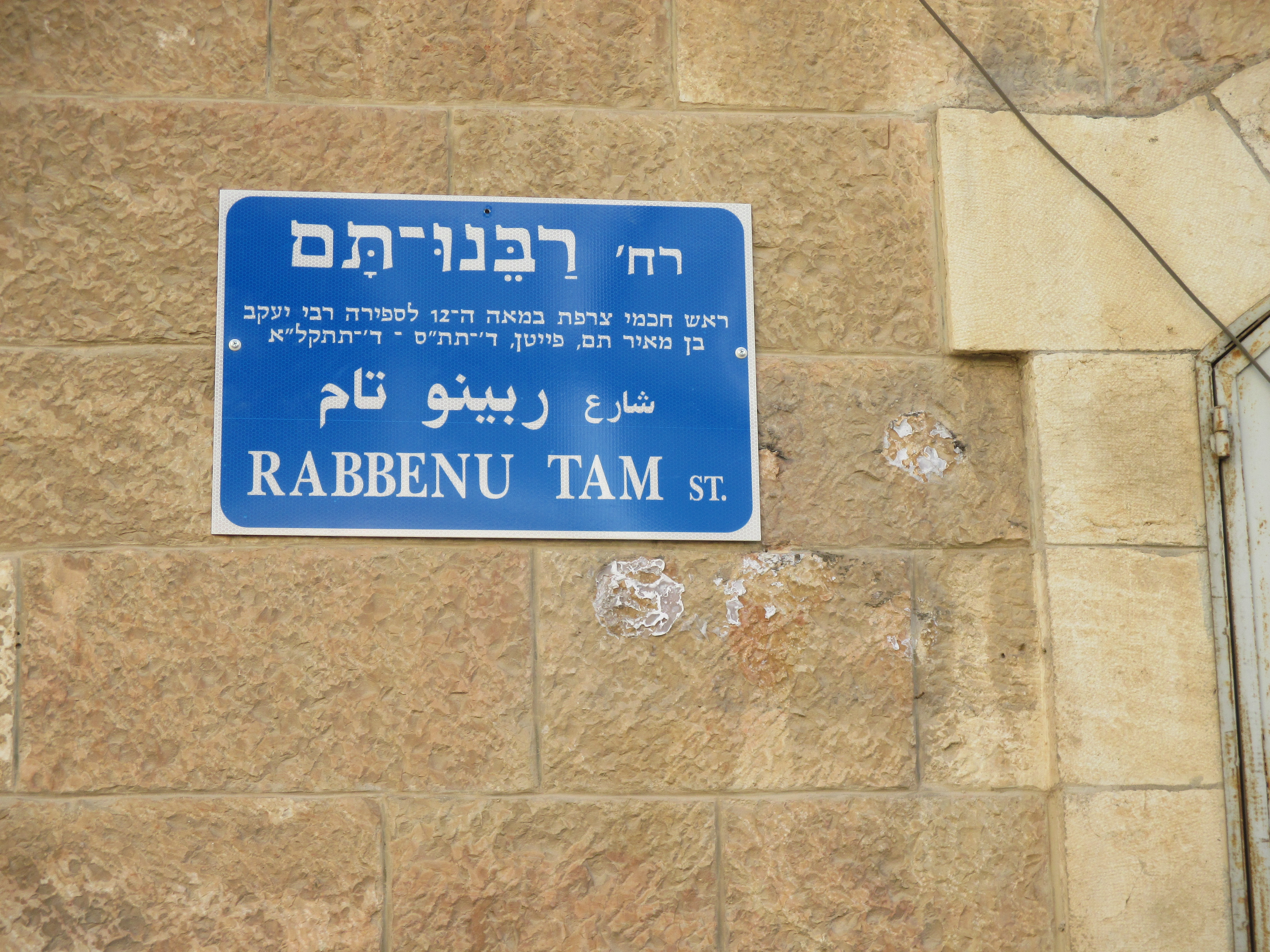 רחוב על שמו בירושלים